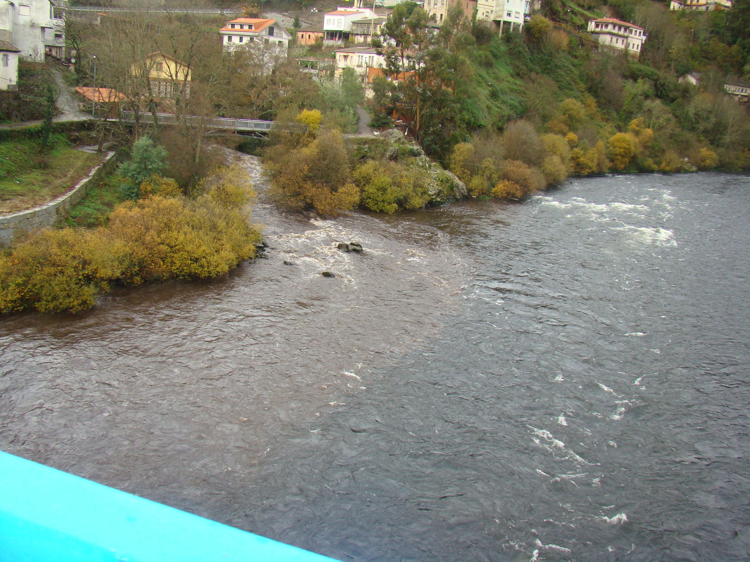 El Río Búbal desembocando en el Río Miño en la localidad de Los Peares